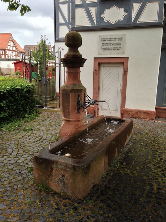 Dorfbrunnen am Rathaus. Entstehung 1730. Restaurierung im Jahr 2006